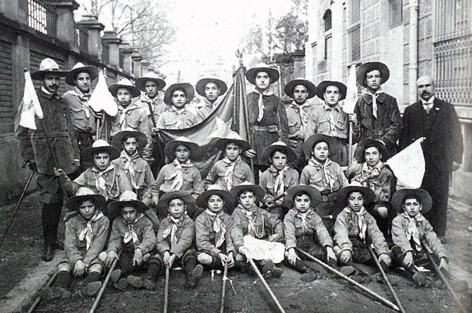 Exploradores Barceloneses, Grupo Barcino, con el capitán Pere Rosselló a la izquierda y el director de escuela Juan Durán a la derecha.